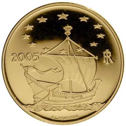 Dritto della moneta commemorativa in oro da 50 euro del 2005.